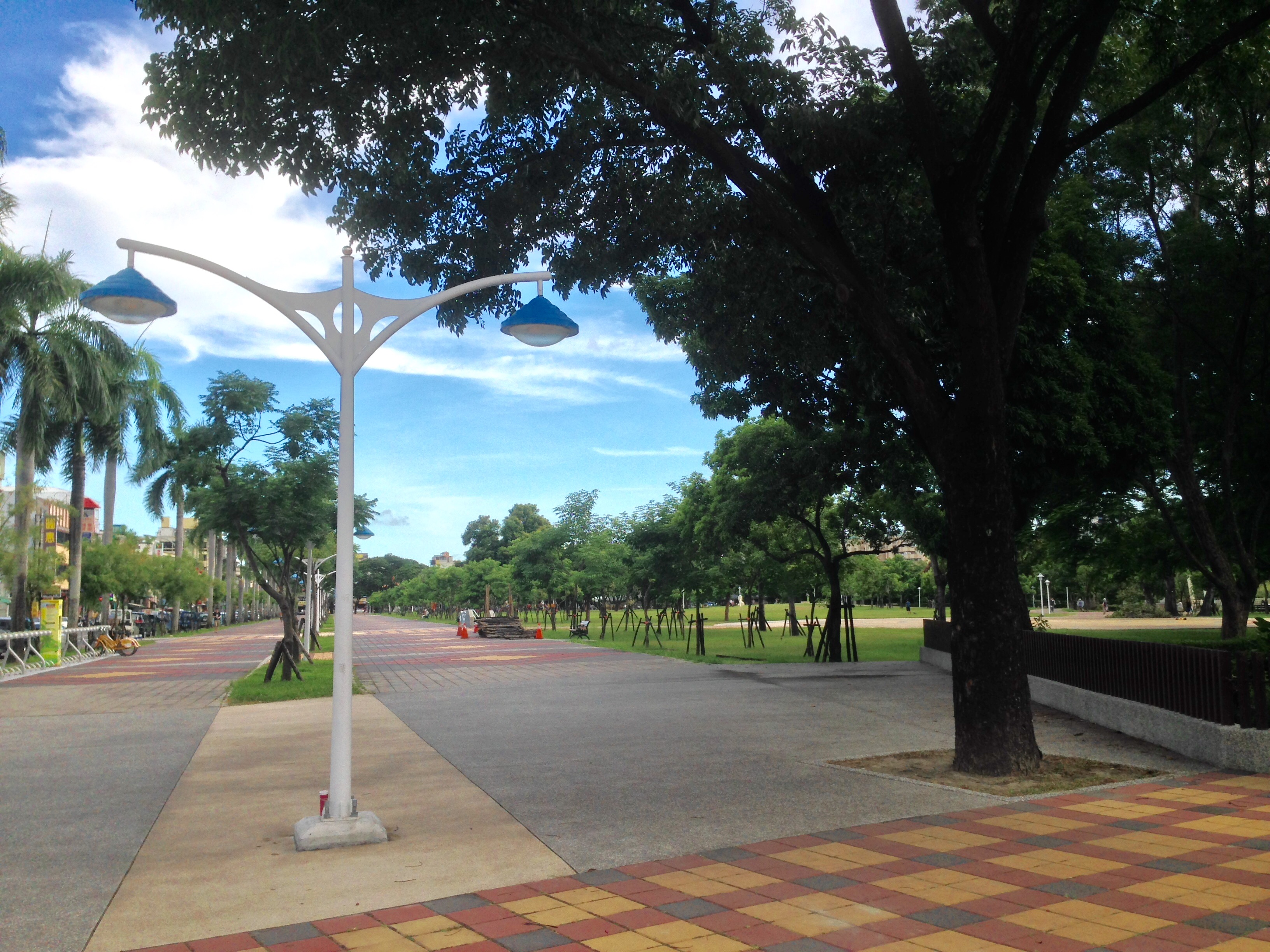 中文（台灣）: 屏東市千禧公園